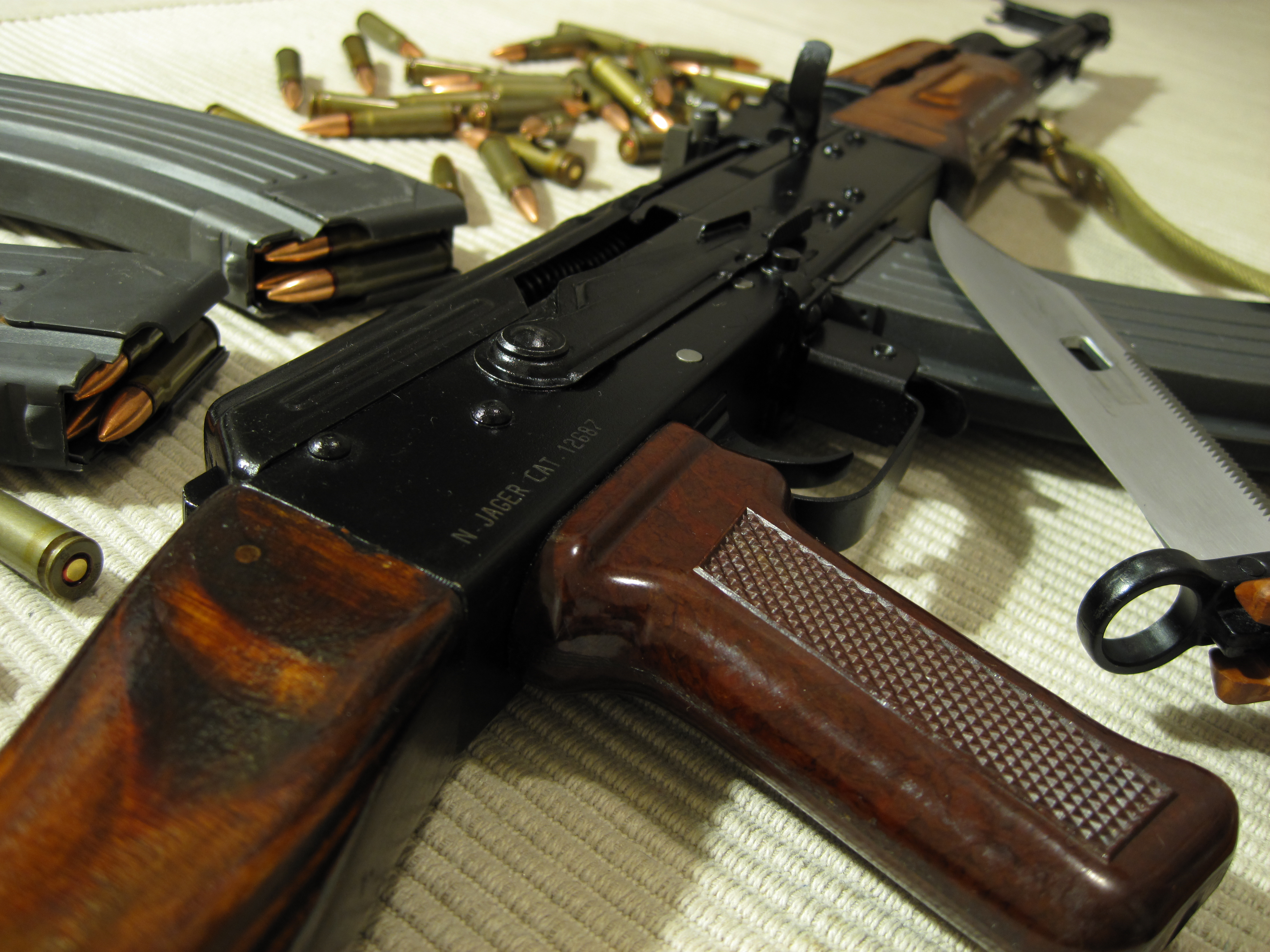 47AK con caricatore e baionetta